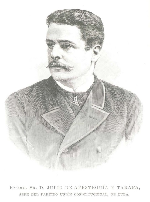 Excmo. Sr. D. Julio de Apezteguía y Tarafa, Jefe del Partido Unión Constitucional de Cuba